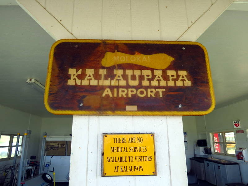 Kalaupapa Airport